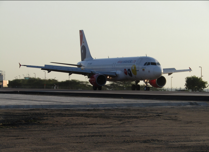 Santa Marta, Colombia